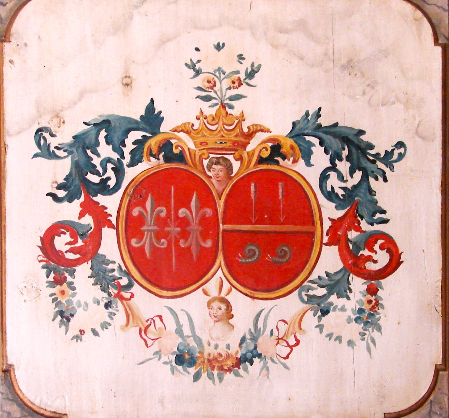 Alliancevåben for Anne Deichmann og Jacob Rasch, Solum Kirke, Telemark